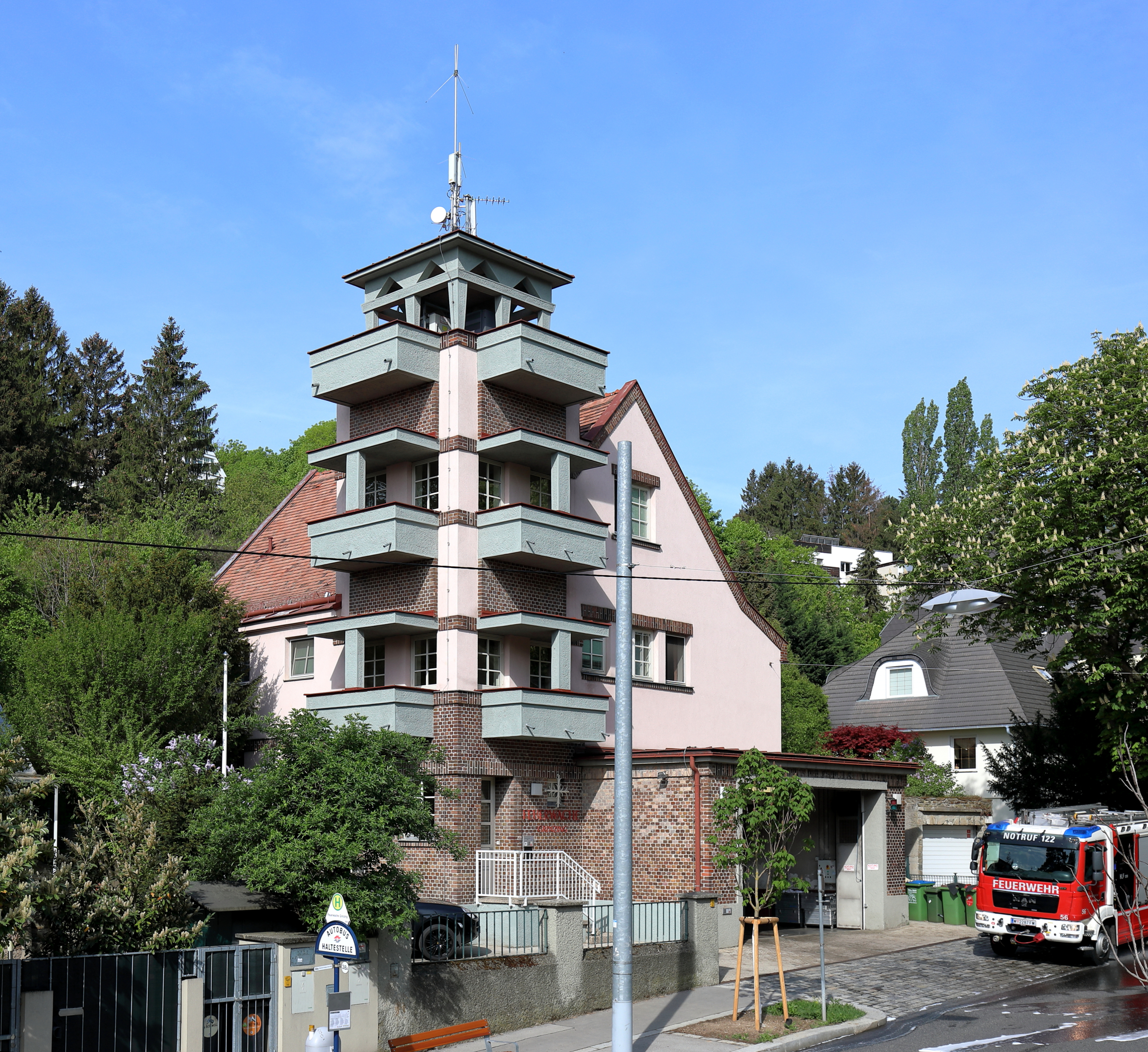 Die Feuerwache Grinzing an der Adresse Cobenzlgasse 63 im 19. Wiener Gemeindebezirk Döbling.Der im Stil der Zwischenkriegszeit entstandene Wachebau wurde nach Plänen der damaligen Magistratsabteilung 22 und des Architekten Konstantin Peller errichtet und am 24. November 1929 bezogen. 1991/92 erfolgte eine Generalsanierung, dabei wurden die zwei Ausfahrtstore durch ein achtflügeliges Automatiktor ersetzt.